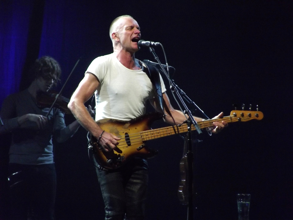 Zdjęcie zrobione podczas drugiego dnia Life Festivalu 2013 w Oświęcimiu.